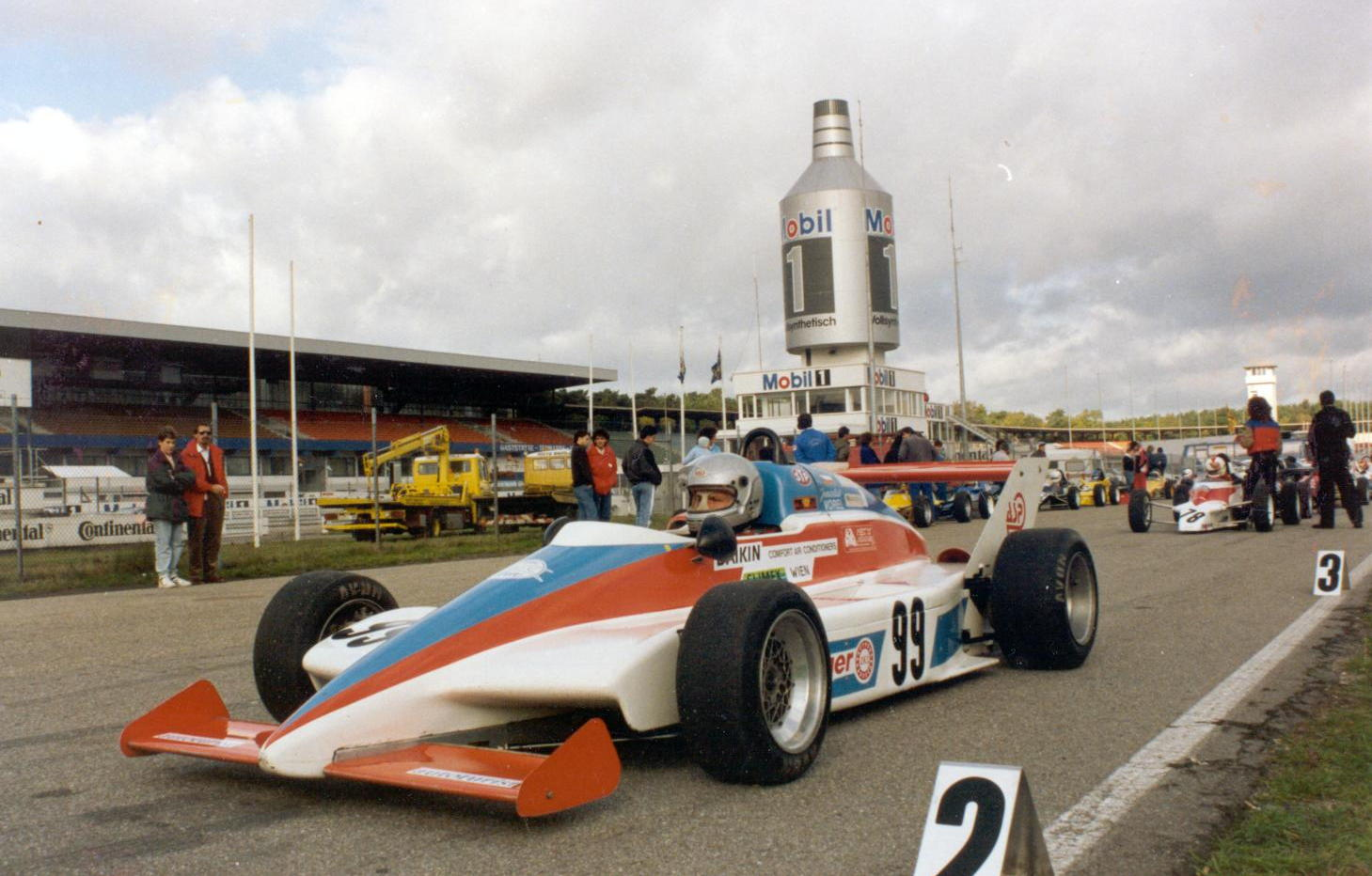 Prvá Česko-Slovenská Formula 3 na okruhu v Hockenheime 1989, Nemecko